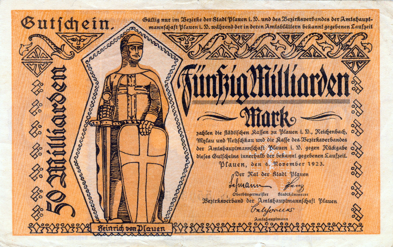 Plauen, Vorderseite eines Notgeldscheins aus der Zeit der Hyperinflation: 50 Milliarden Mark vom 6. 11.1923